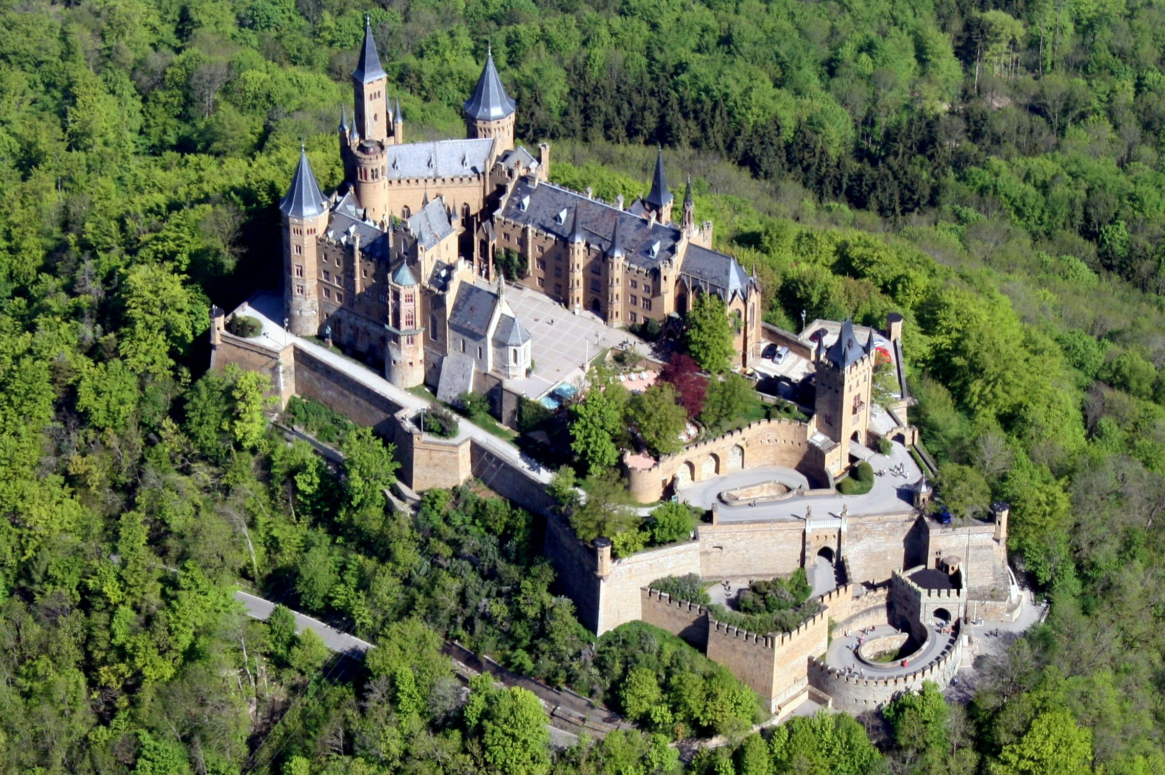 Lutfaufnahme der Burg Hohenzollern im Mai